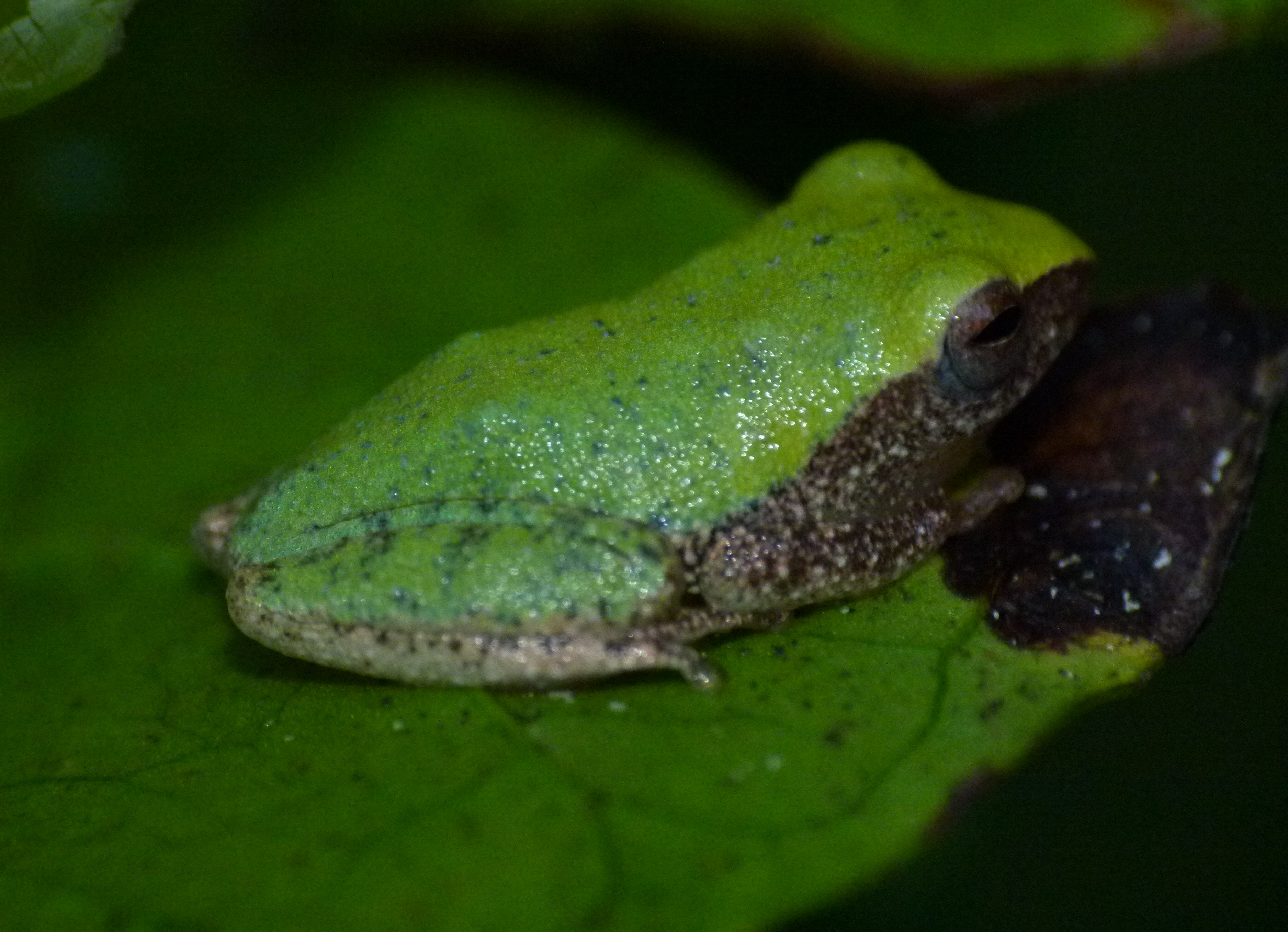 Raorchestes akroparallagi . Wayanad, India.